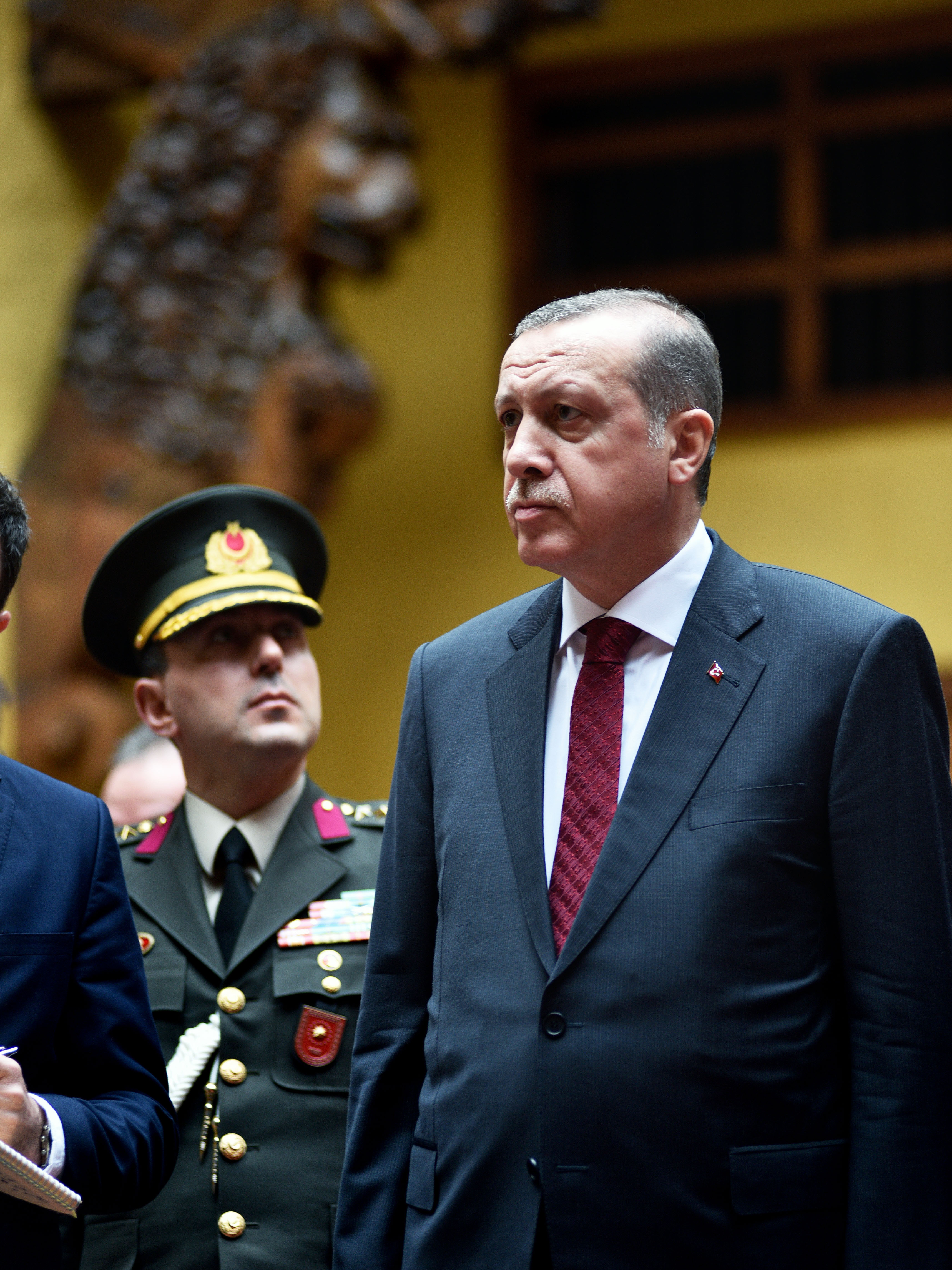 En el Palacio de Torre Tagle, sede de la Cancillería peruana, el Viceministro de Relaciones Exteriores, Embajador Armando Patiño, recibió hoy al Presidente de la República de Turquía, Recep Tayyip Erdogan, quien realiza una visita oficial al Perú con la finalidad de fortalecer e impulsar el diálogo político-diplomático, así como fomentar y diversificar el intercambio comercial y las oportunidades de negocios entre ambos países.